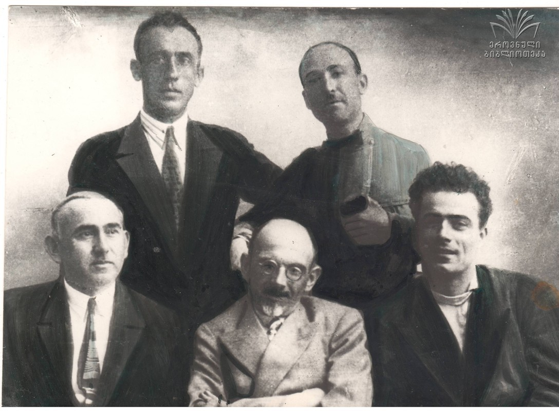 დია ჩიანელი (დავით ჩხეიძე), მიხეილ ჯავახიშვილი, დიმიტრი ბენაშვილი, კოლაუ ნადირაძე, შაჰრუხ ჩარკვიანი